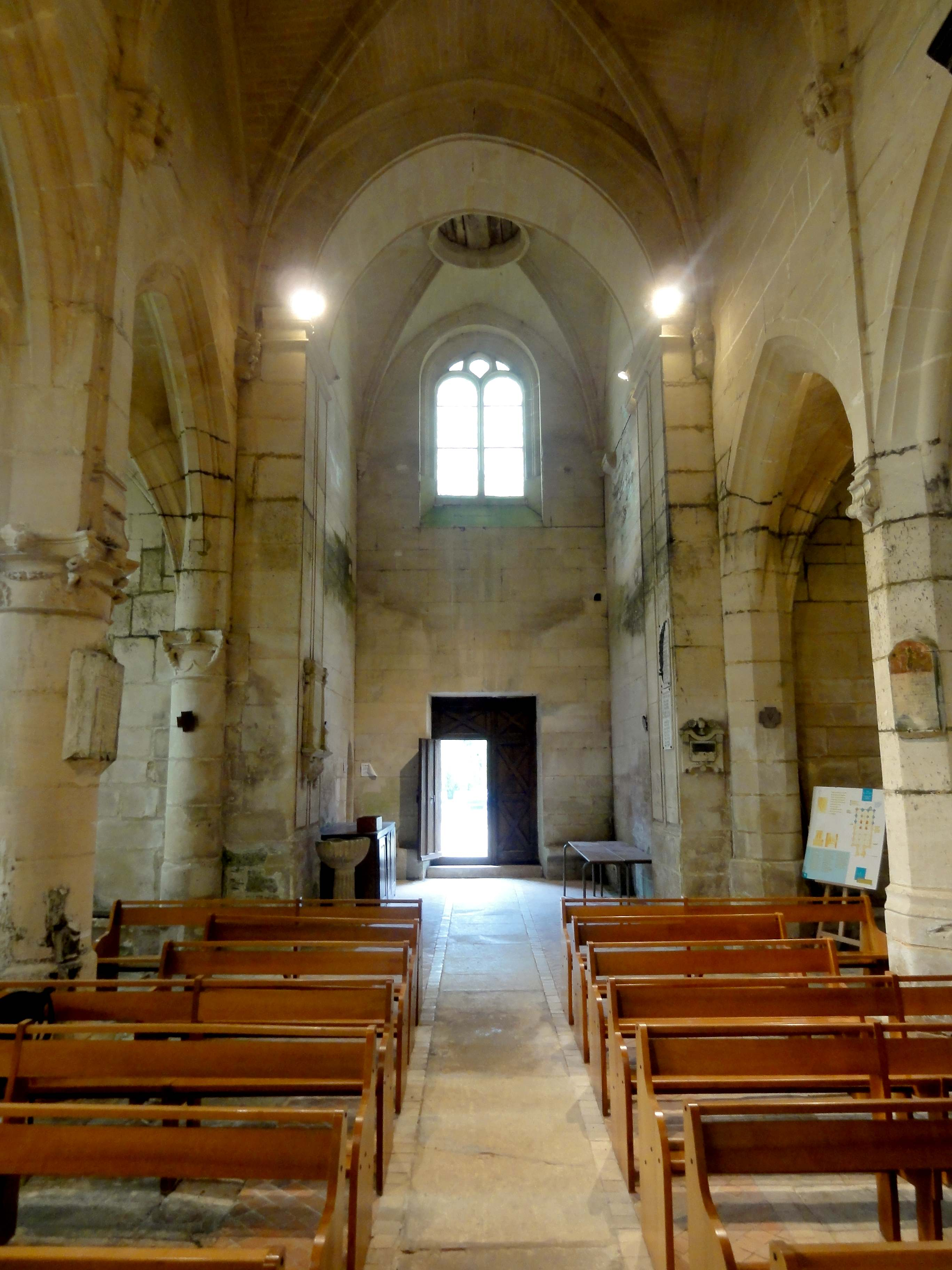 Intérieur de l'église - voir titre.